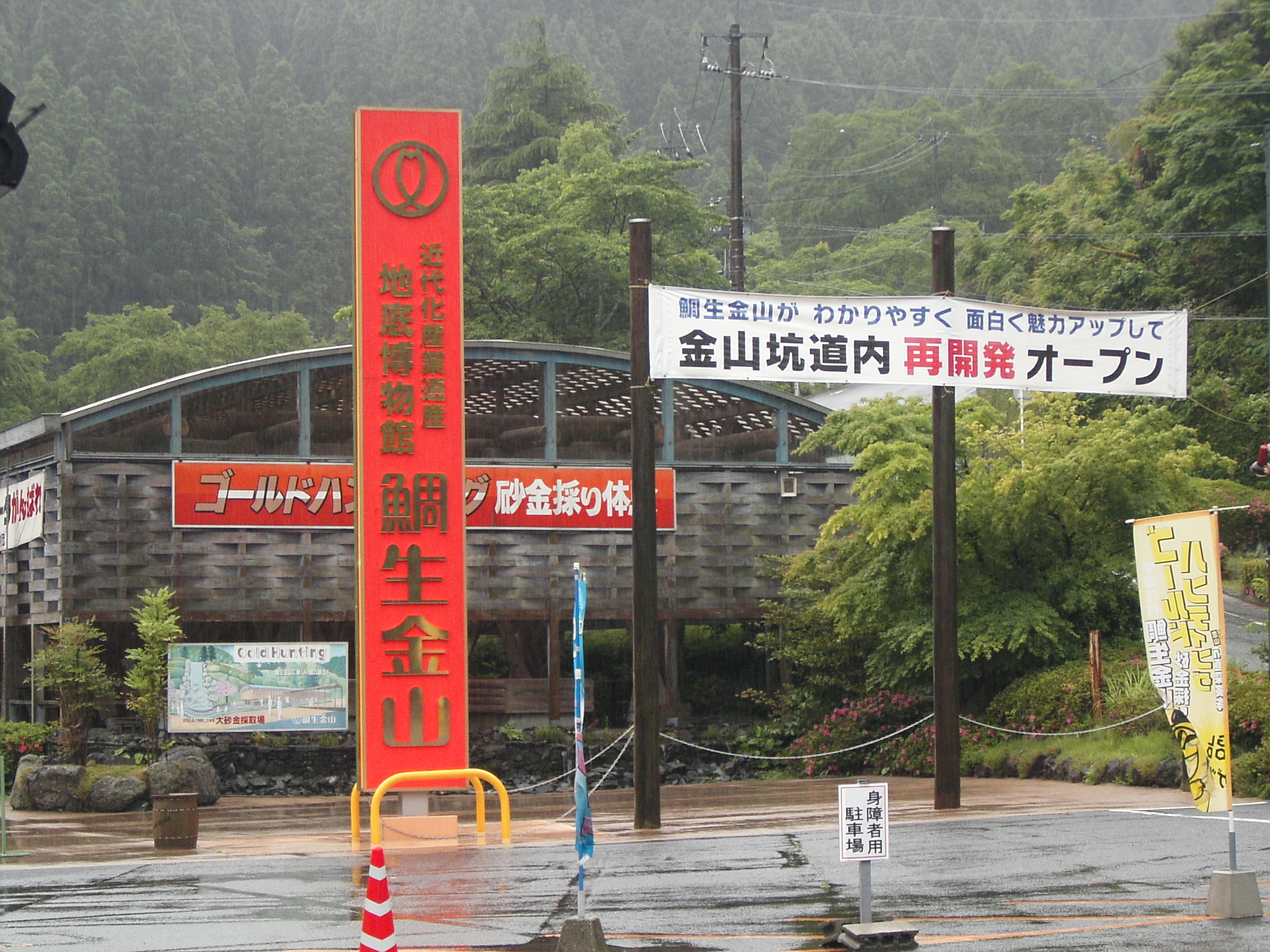 雨に濡れる鯛生金山